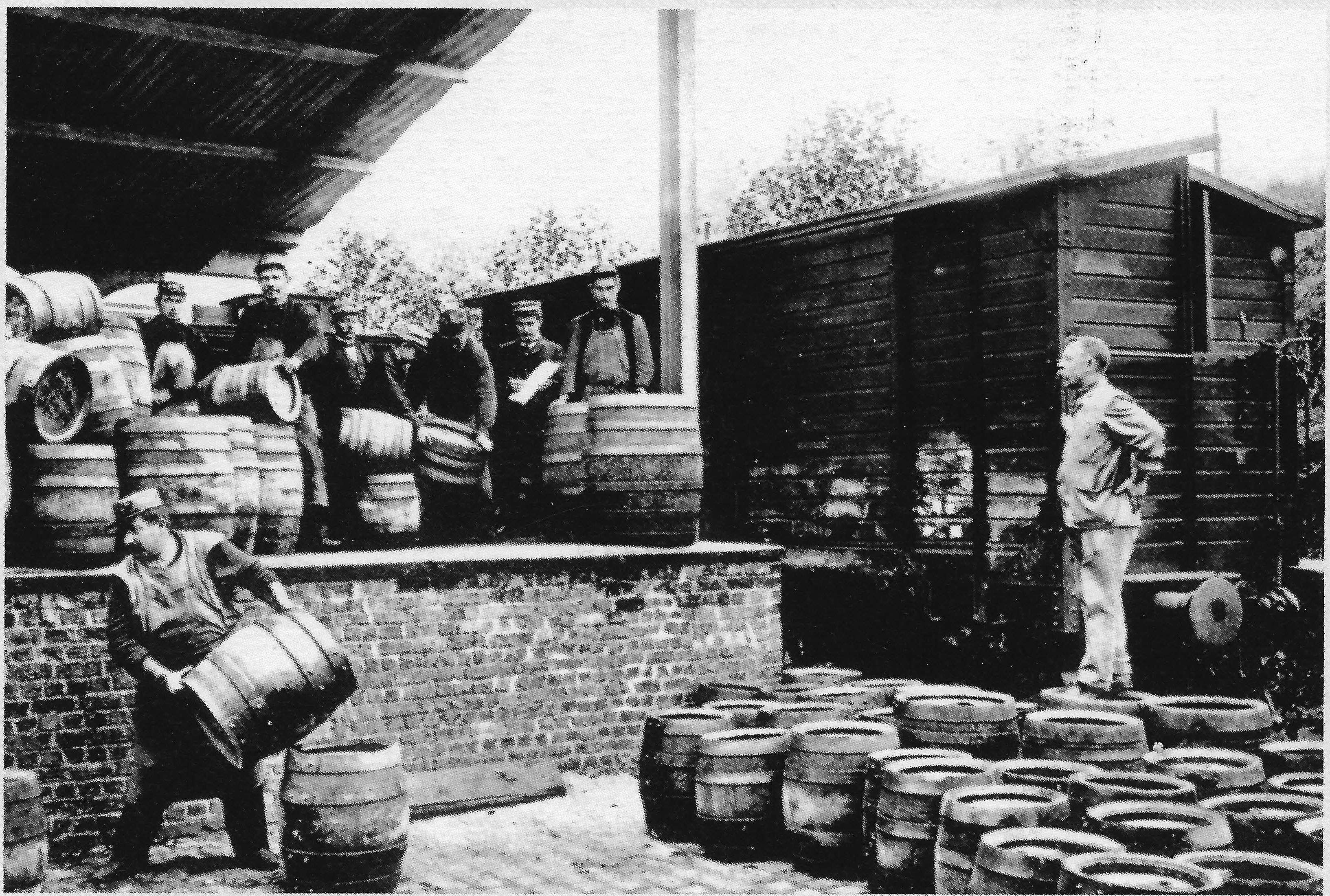 Scene de la vie quotidienne a la brasserie Wielemans avant 1914